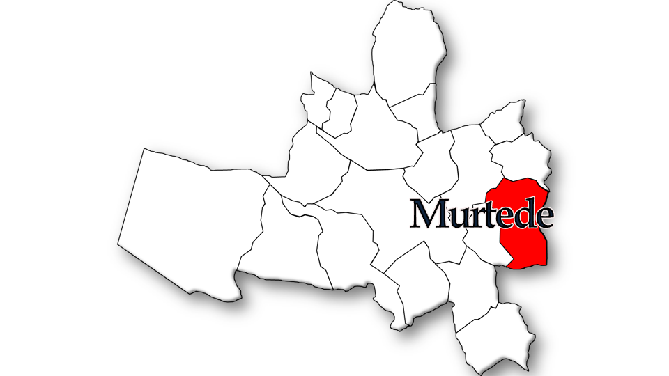 Português